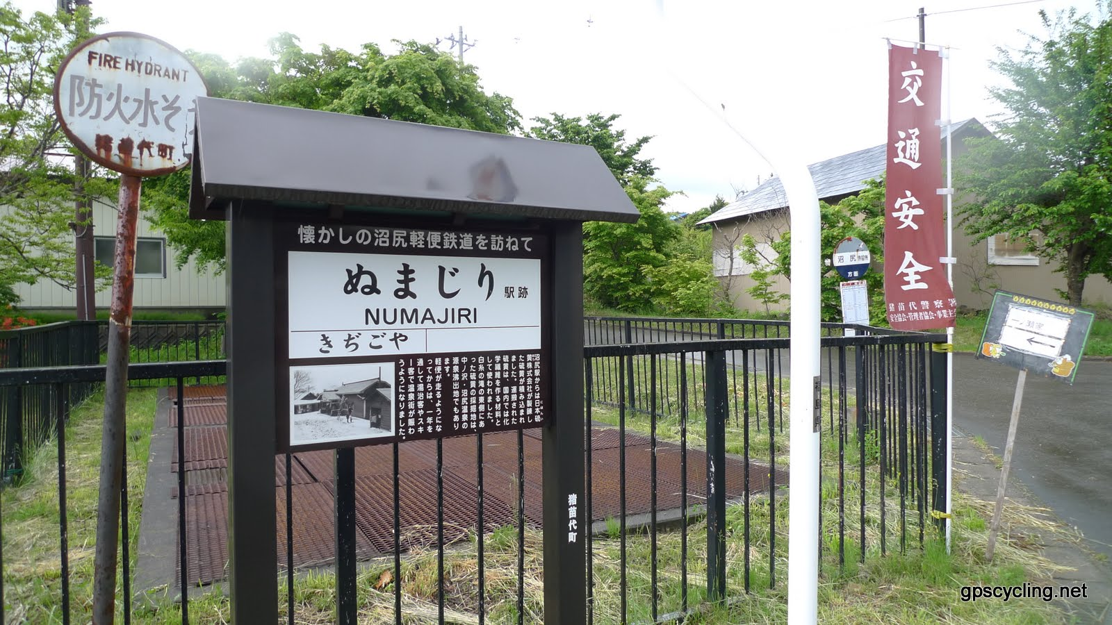 沼尻軽便鉄道沼尻駅跡